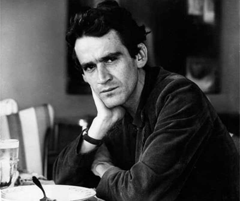 Foto tomada de El Tiempo. disponible en* [1]